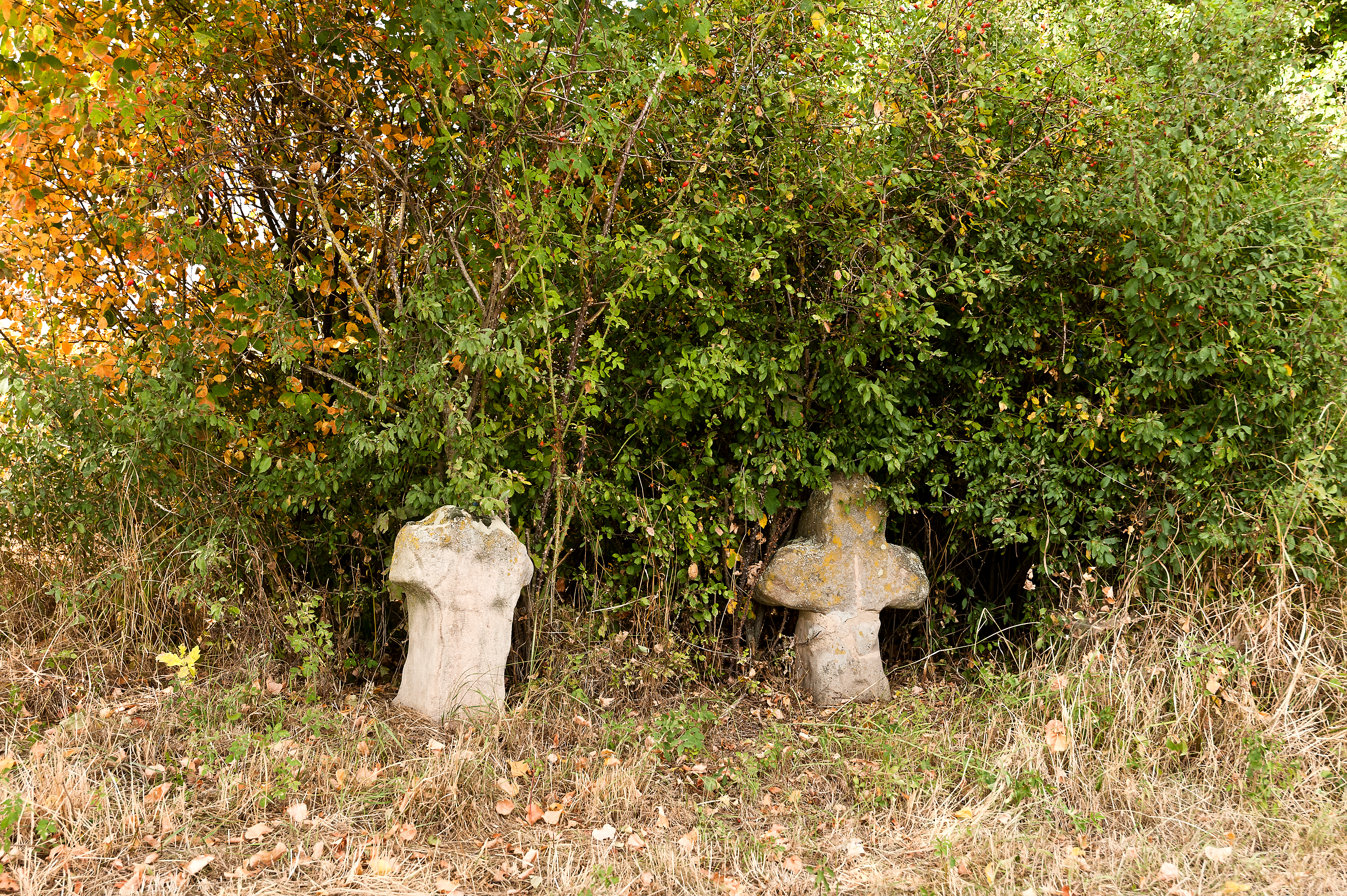 Roßendorf Steinkreuze This is a photograph of an architectural monument.